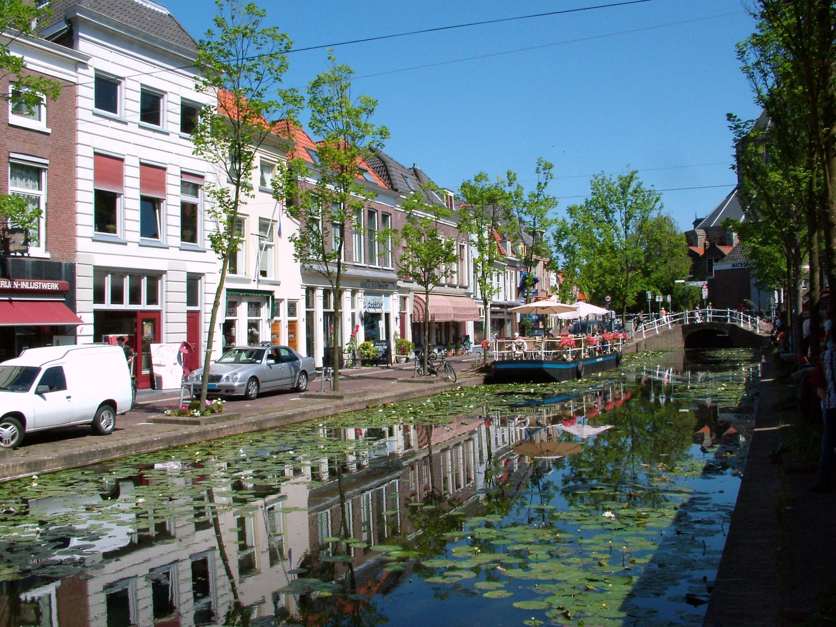 Vrouwjuttenland, Delft